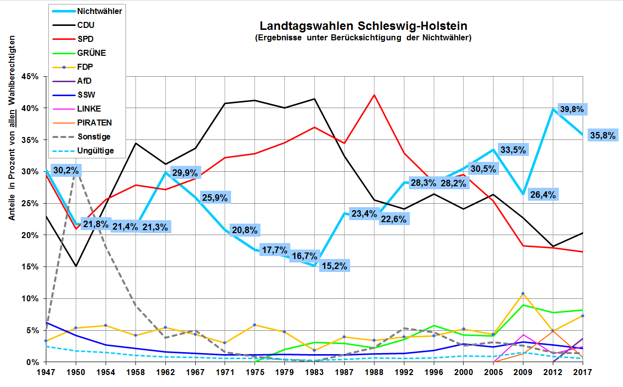 Historie des Anteils der Nichtwähler bei den Landtagswahlen in Schleswig-Holstein